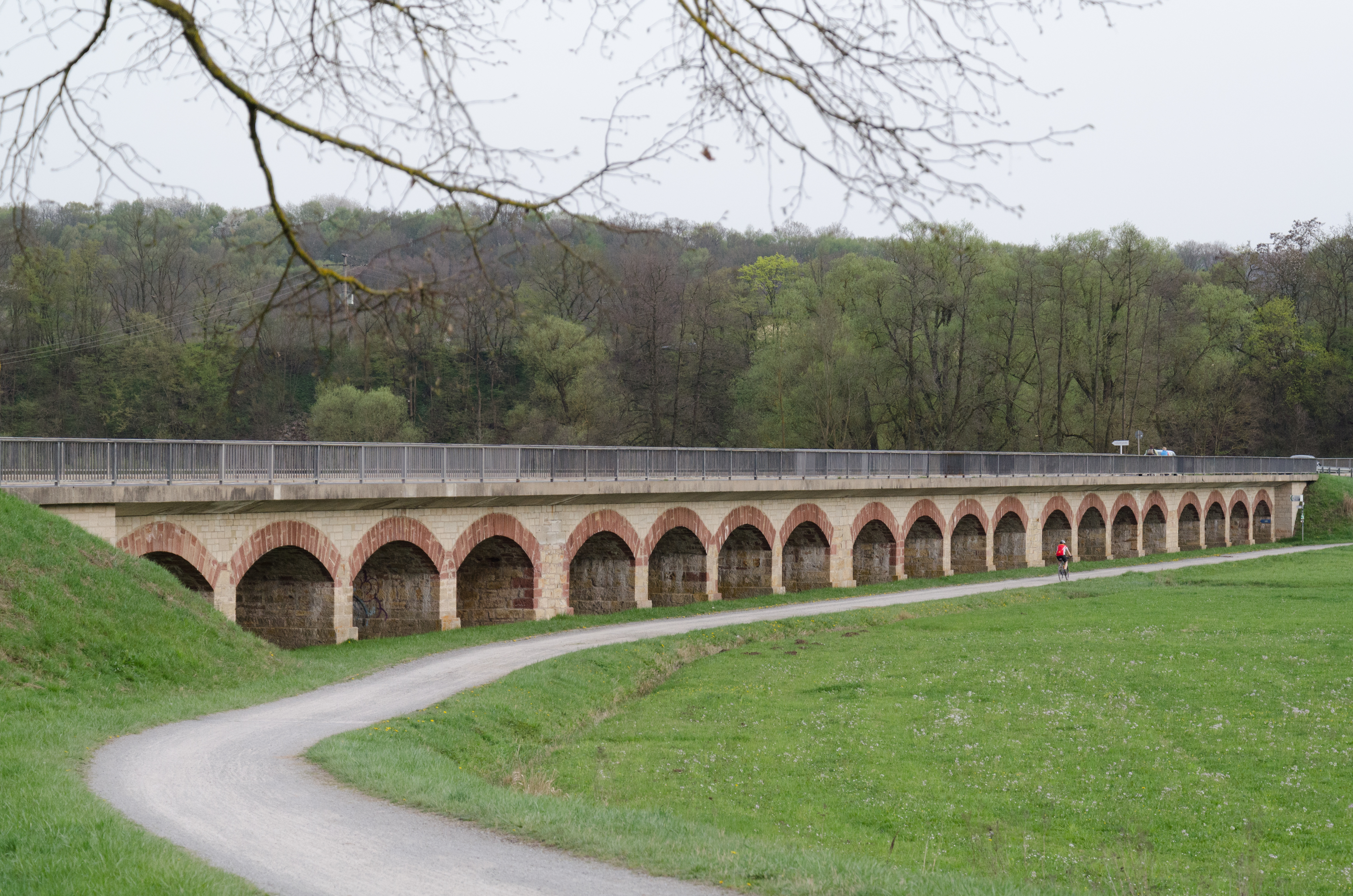 Bad Kissingen, Kleinbrach, Bogenbrücke